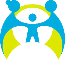 Sumber: Keputusan Menteri Negara Pemberdayaan Perempuan dan Perlindungan Anak Nomor 63 Tahun 2010